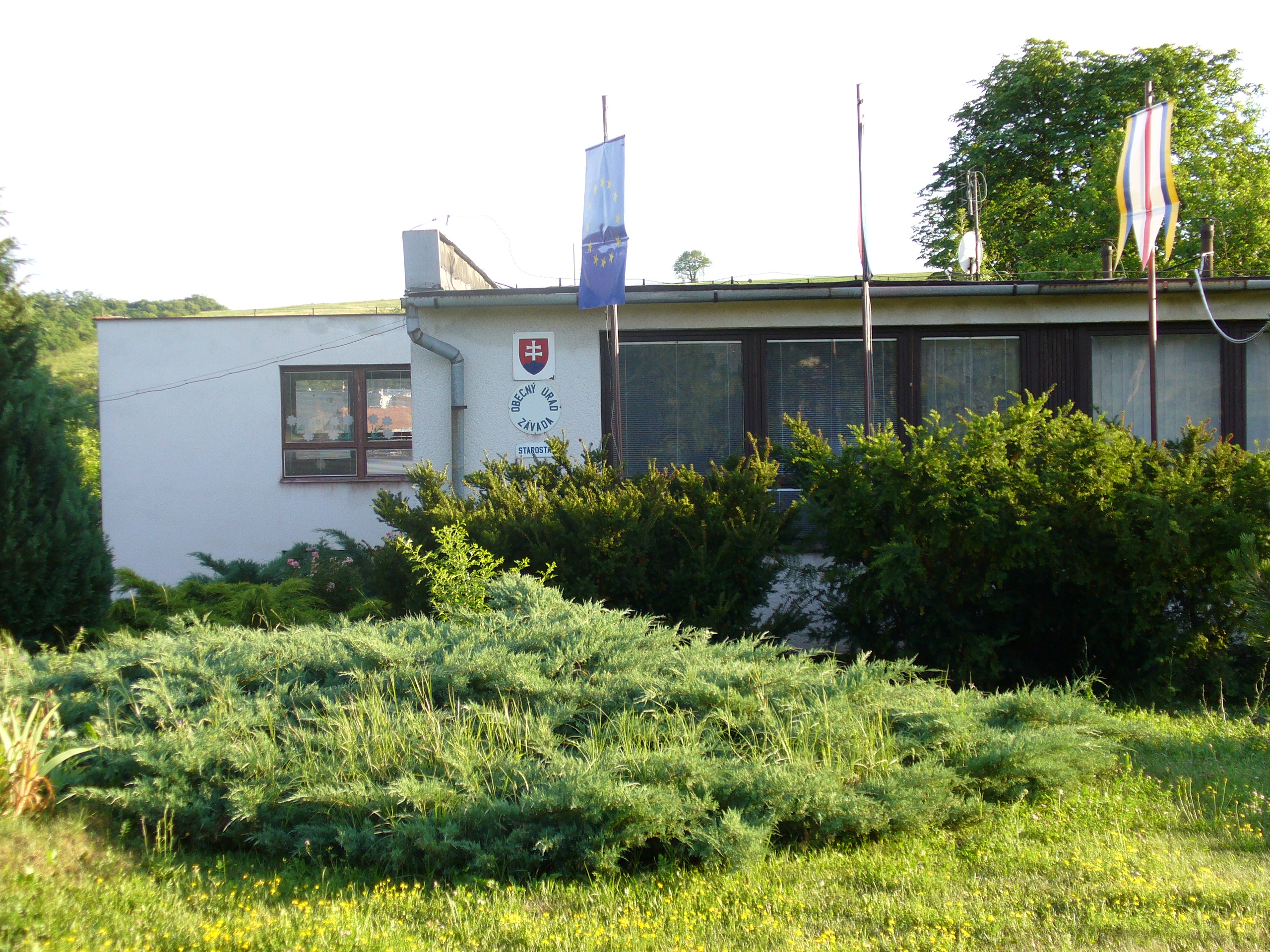 Obecný úrad Závada